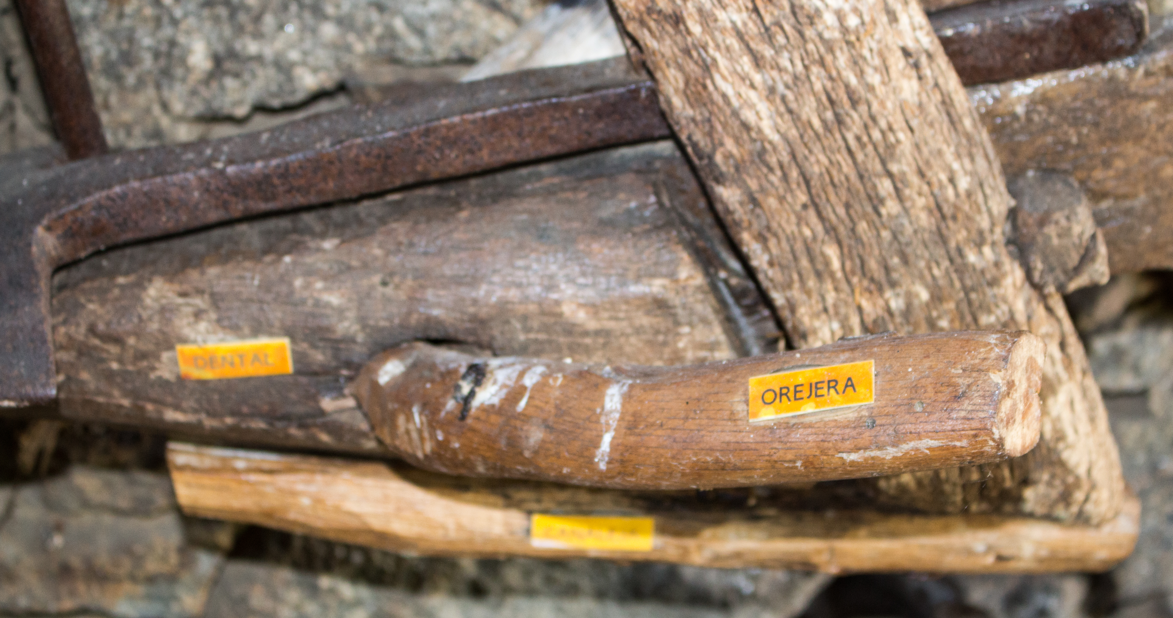 Vista de detalle de la parte inferior del arado romano. Se distinguen el dental, la orejera y la canaleja; en la parte superior, una porción de la reja.